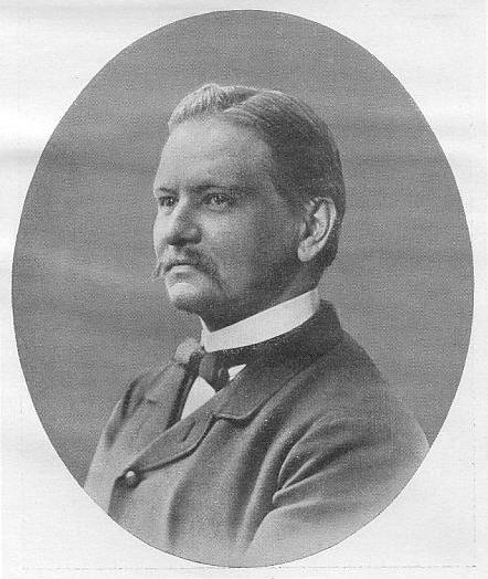 Ivo Bruns (1853–1901), deutscher klassischer Philologe. Originalphotographie von Schmidt & Wegener Nachf. Kiel (aus dem Besicht von Felix Jacoby).